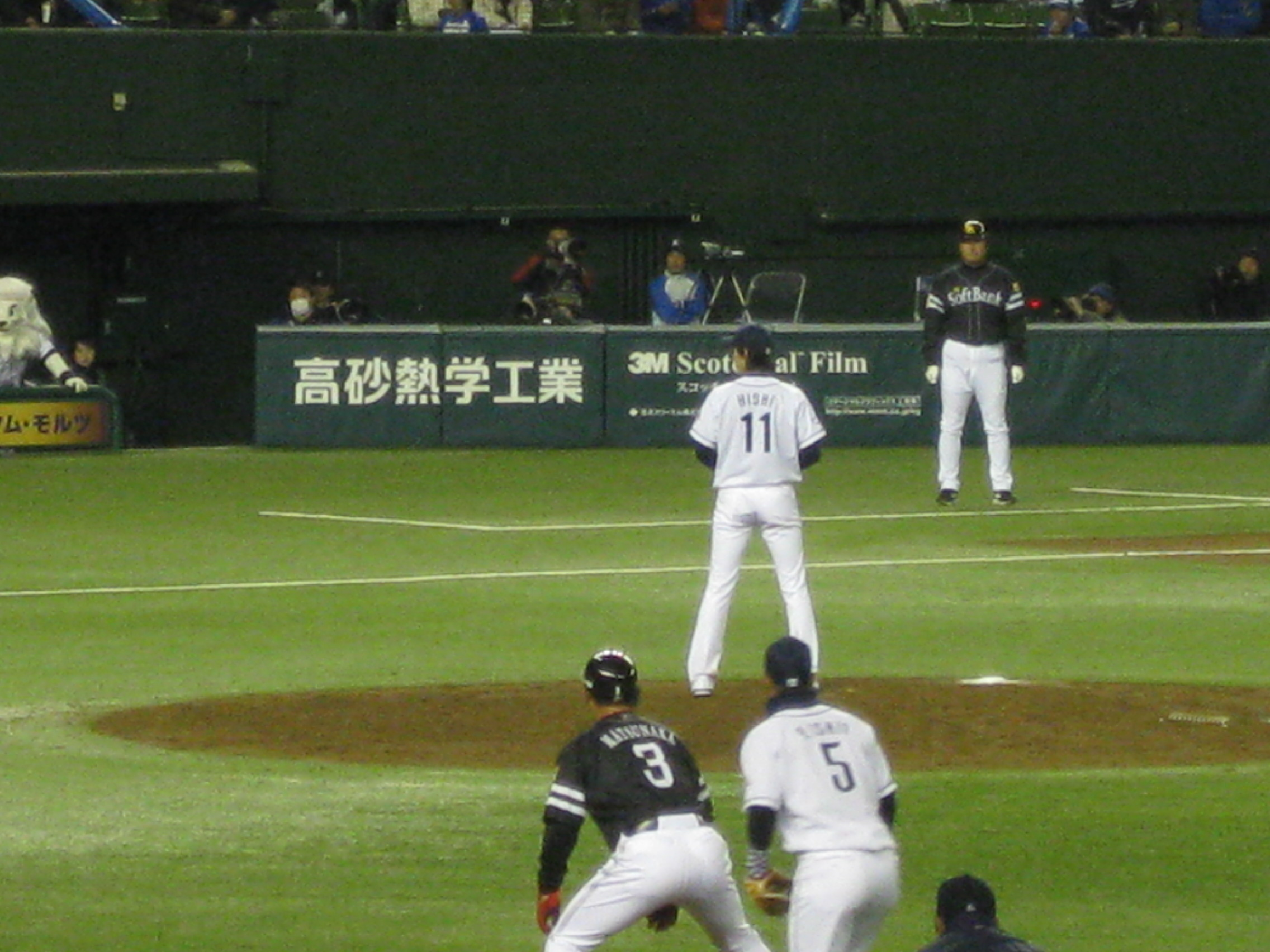 マウンド上の岸